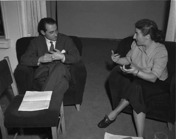 Atelier di Germana Marucelli: interno - Laboratorio "Giovedì di Germana Marucelli" - Ritratto: Germana Marucelli stilista e Ettore Sottsass designer